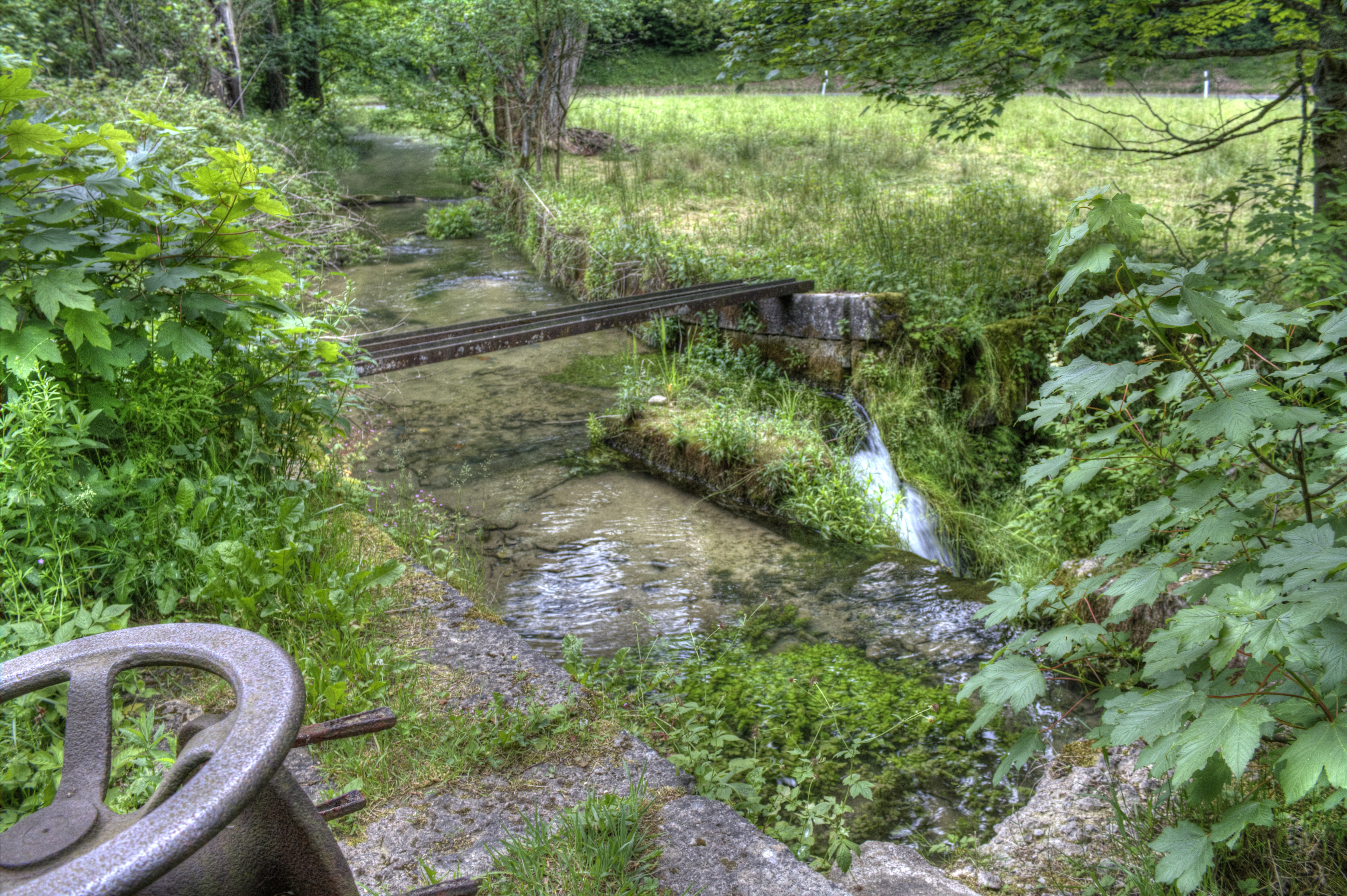 Rest der Wehranlage der Bienleinsmühle